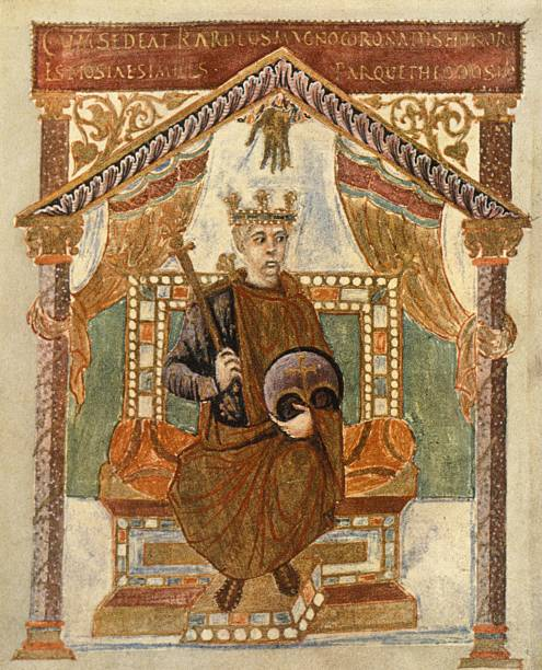 Carlo il Calvo, salterio, Paris, Bibliothèque Nationale